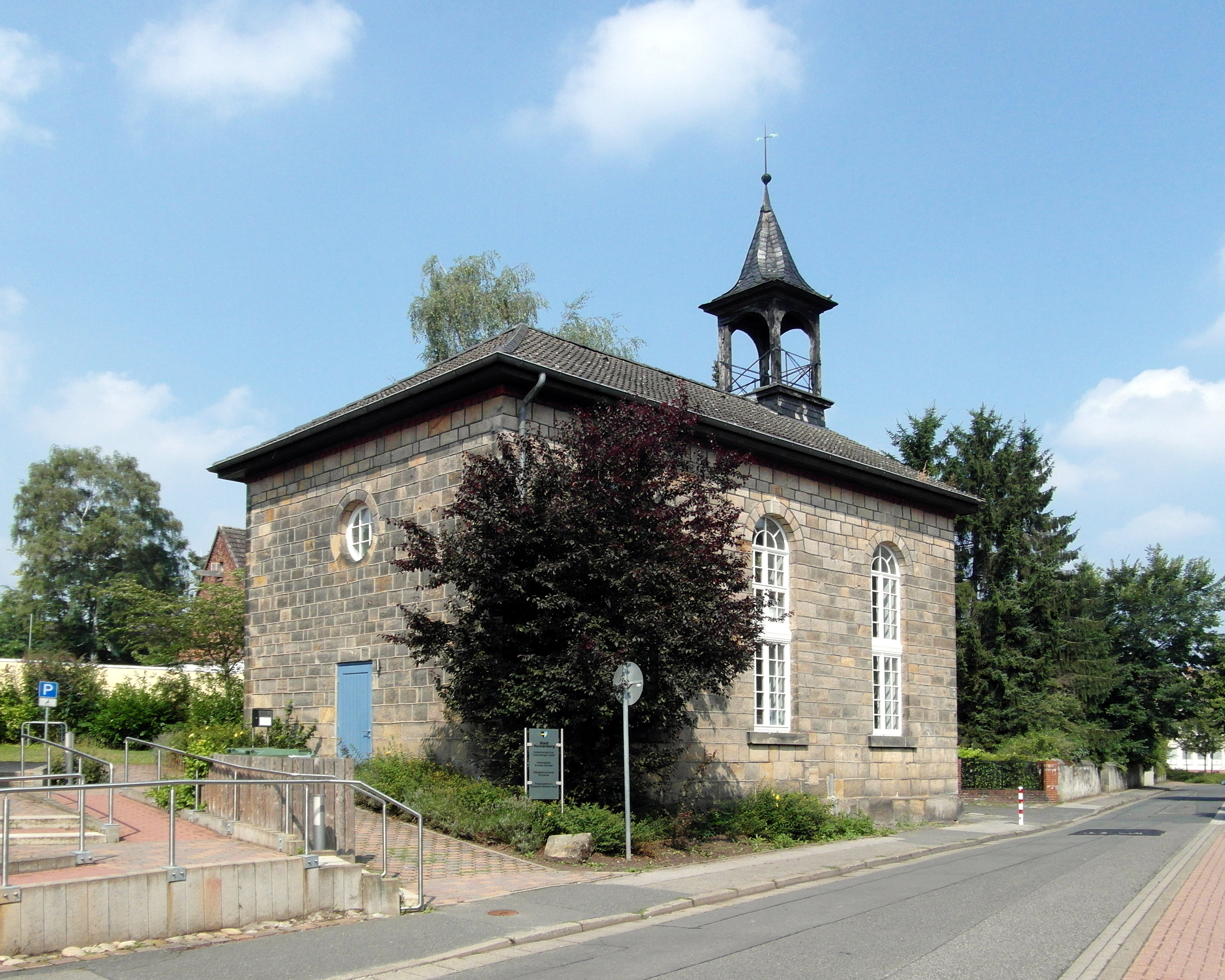 Ronnenberg, alte Kapelle Empelde. Heute genutzt als Stadtteilbibliothek